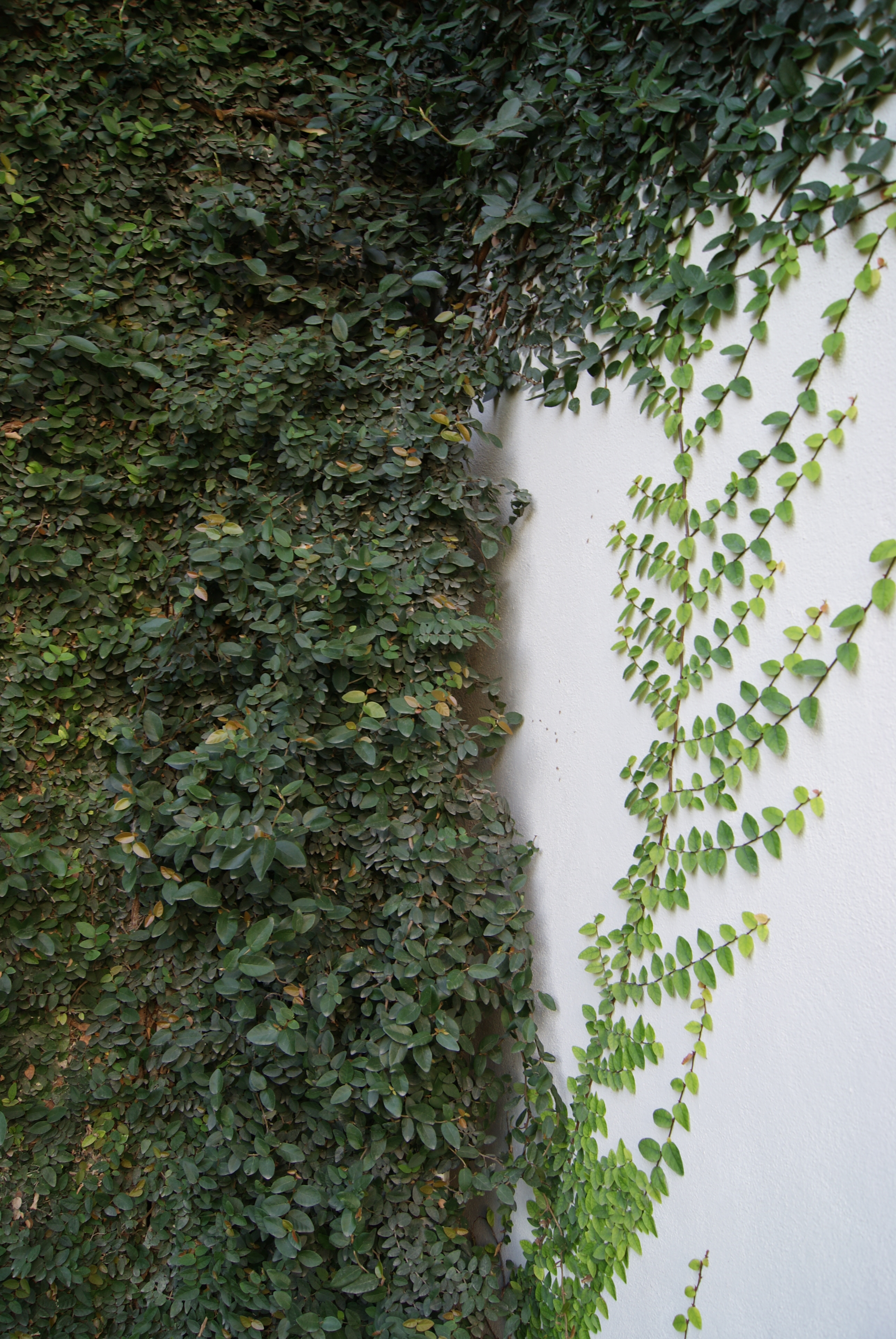 Variedad de ficus también conocida como ficus repens ó ficus moneda con importante potencial en la fitorremediación de la calidad del aire